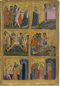 Retaule de sant Vicenç del mestre de Estopanyà, cap a 1350-1370.